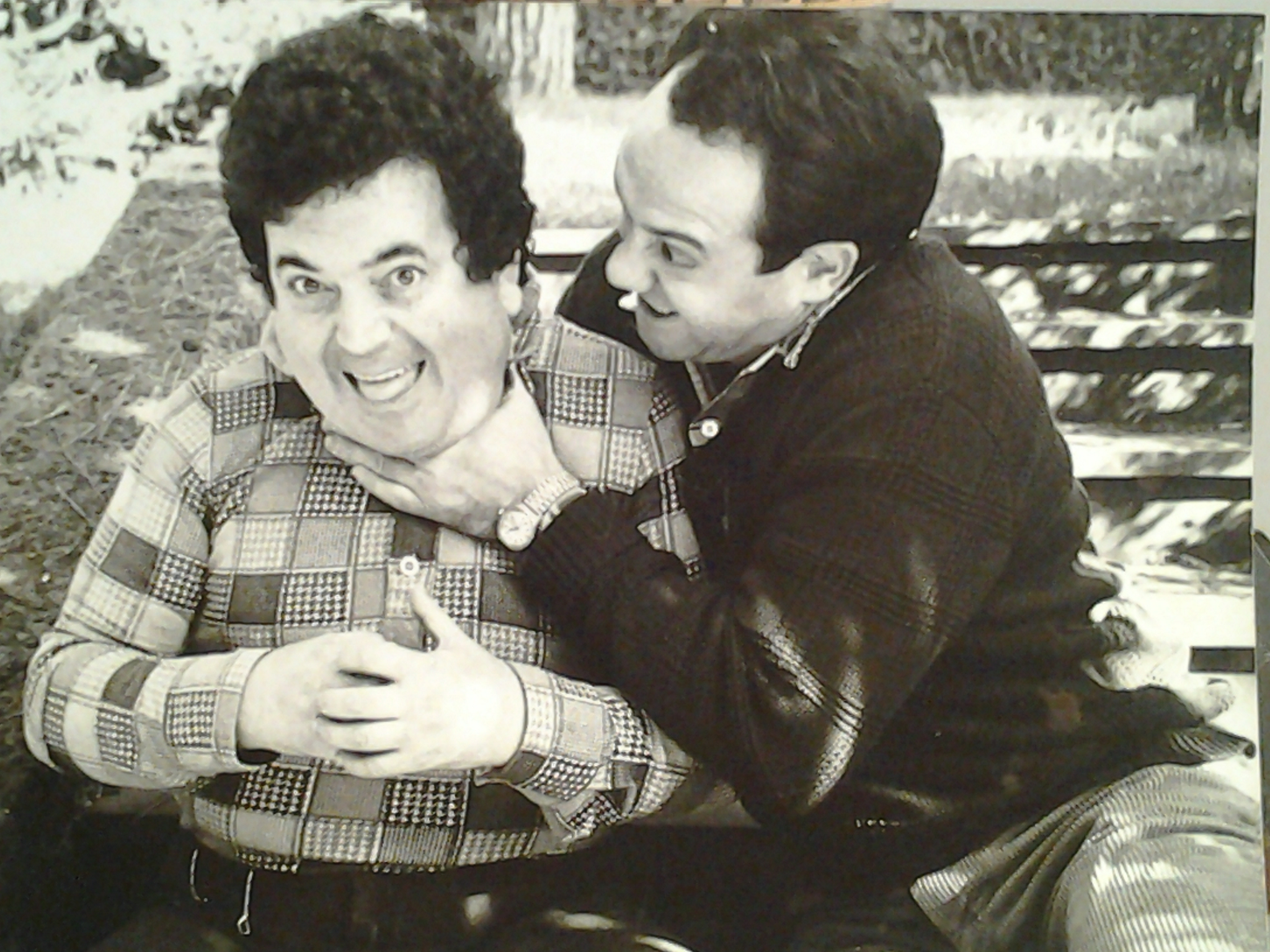 Una mia foto durante le riprese di un film dove ho curato il montaggio